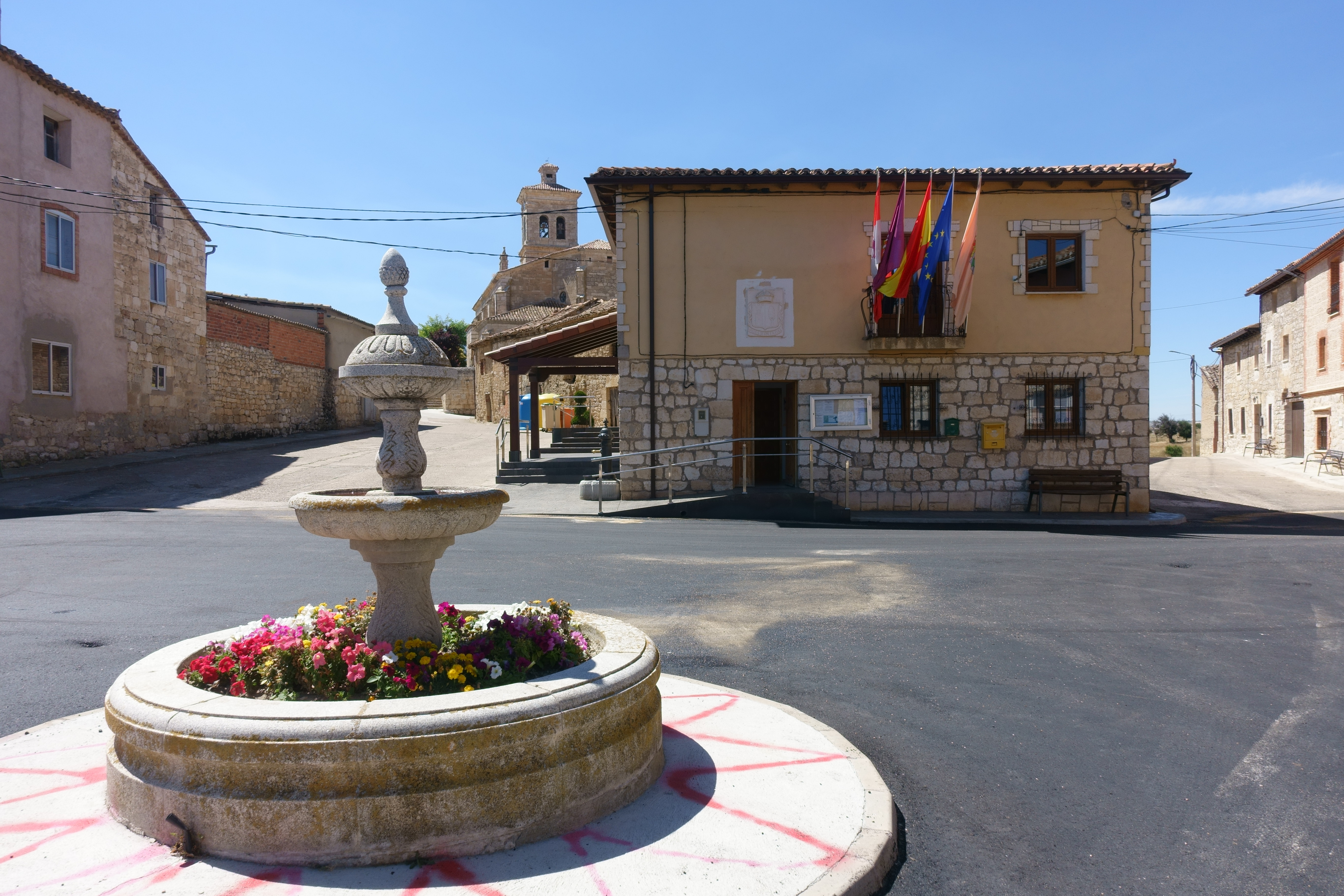 Casa consistorial de Valles de Palenzuela (Burgos, España).